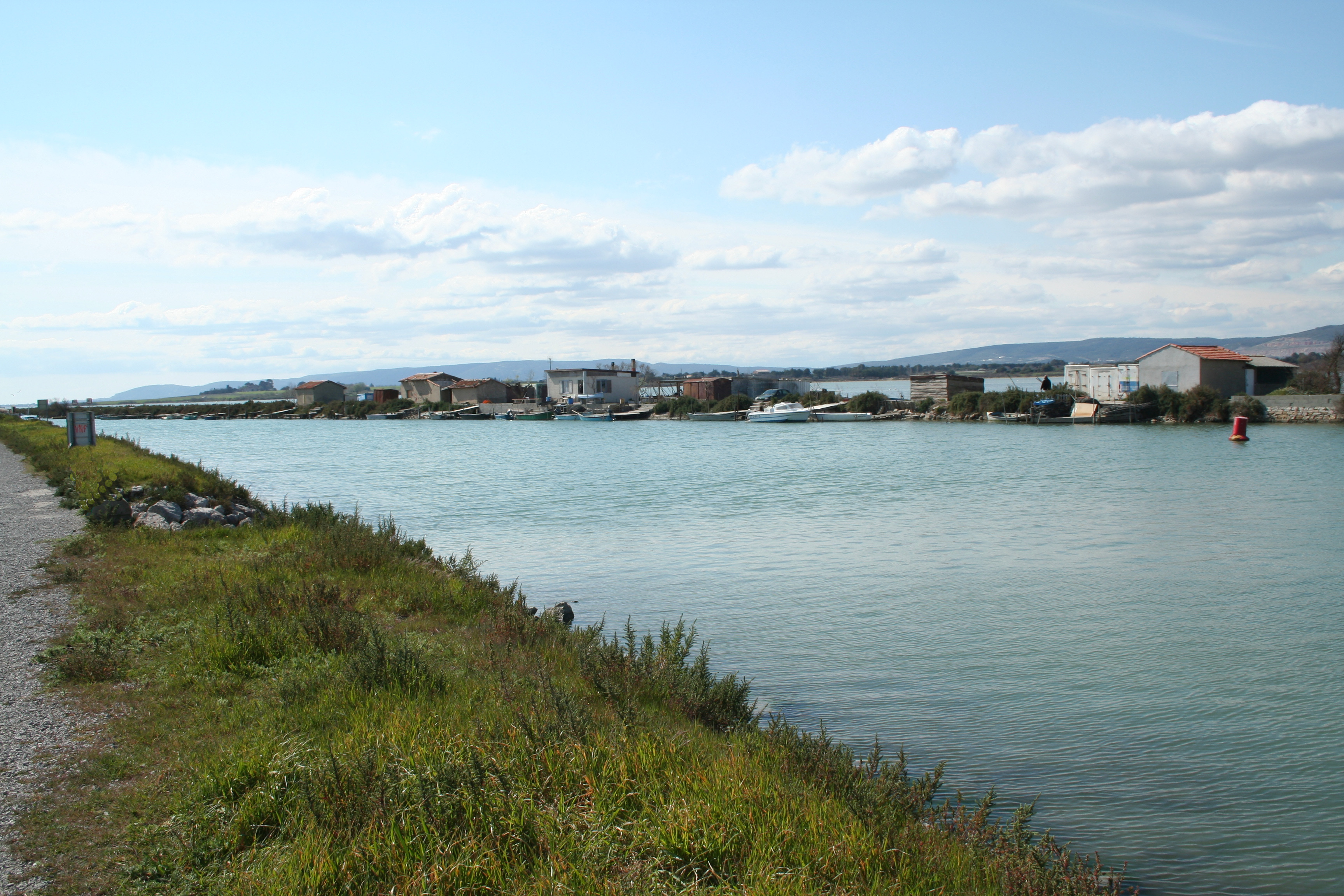 Villeneuve-lès-Maguelone (Hérault) - canal du Rhône à Sète.